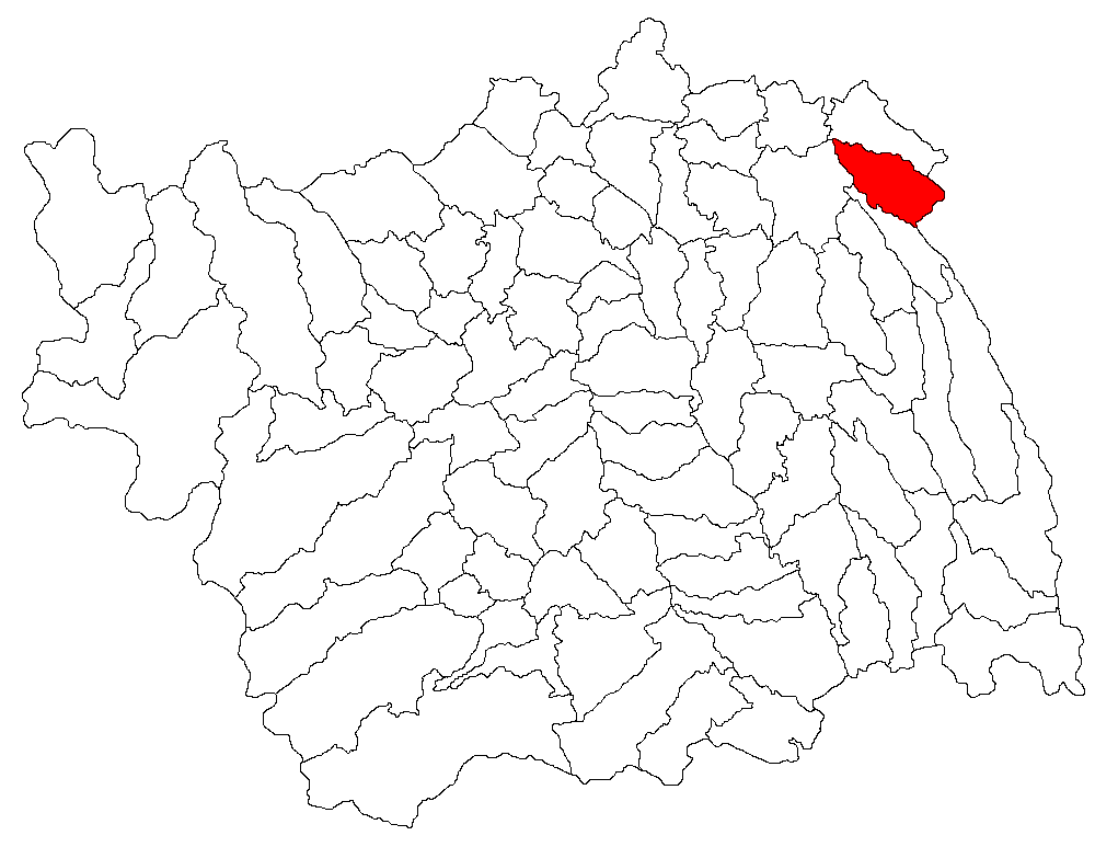 Categorie:Hărţi ale judeţului Bacău